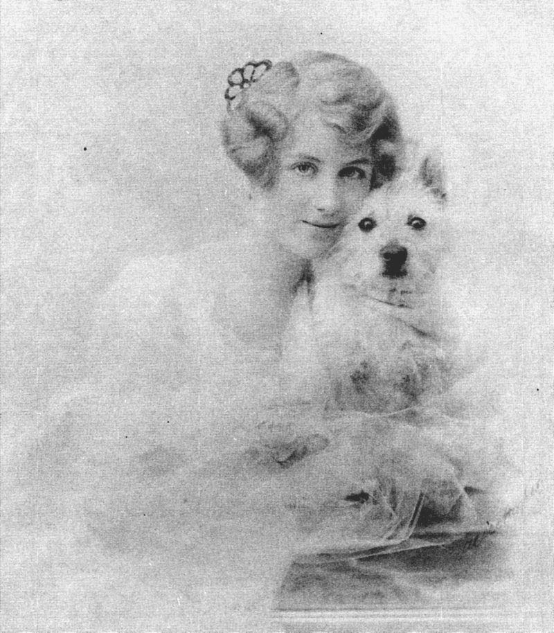 Adelina Munro Drysdale. Fotografía tomada poco antes de contraer enlace